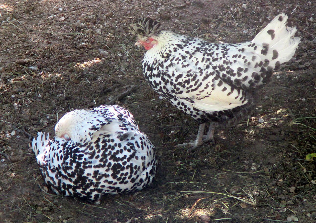 Höns av rasen Appenzeller Spitzhauben i Mössebergs djurpark, Falköping, Falköpings kommun, f.d. Skaraborgs län, Västergötland, Västra Götalands län, Sverige.